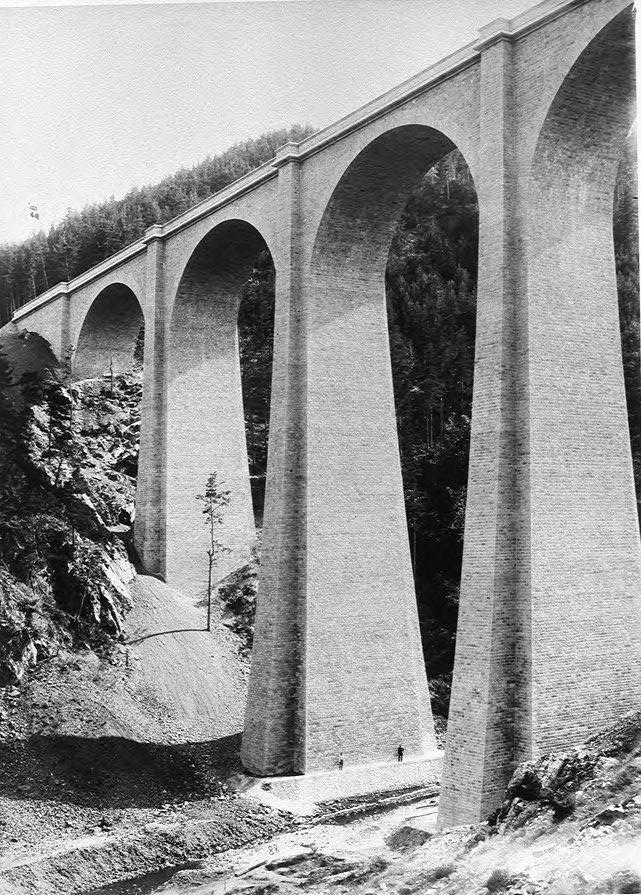 Viaduc de la Crueize